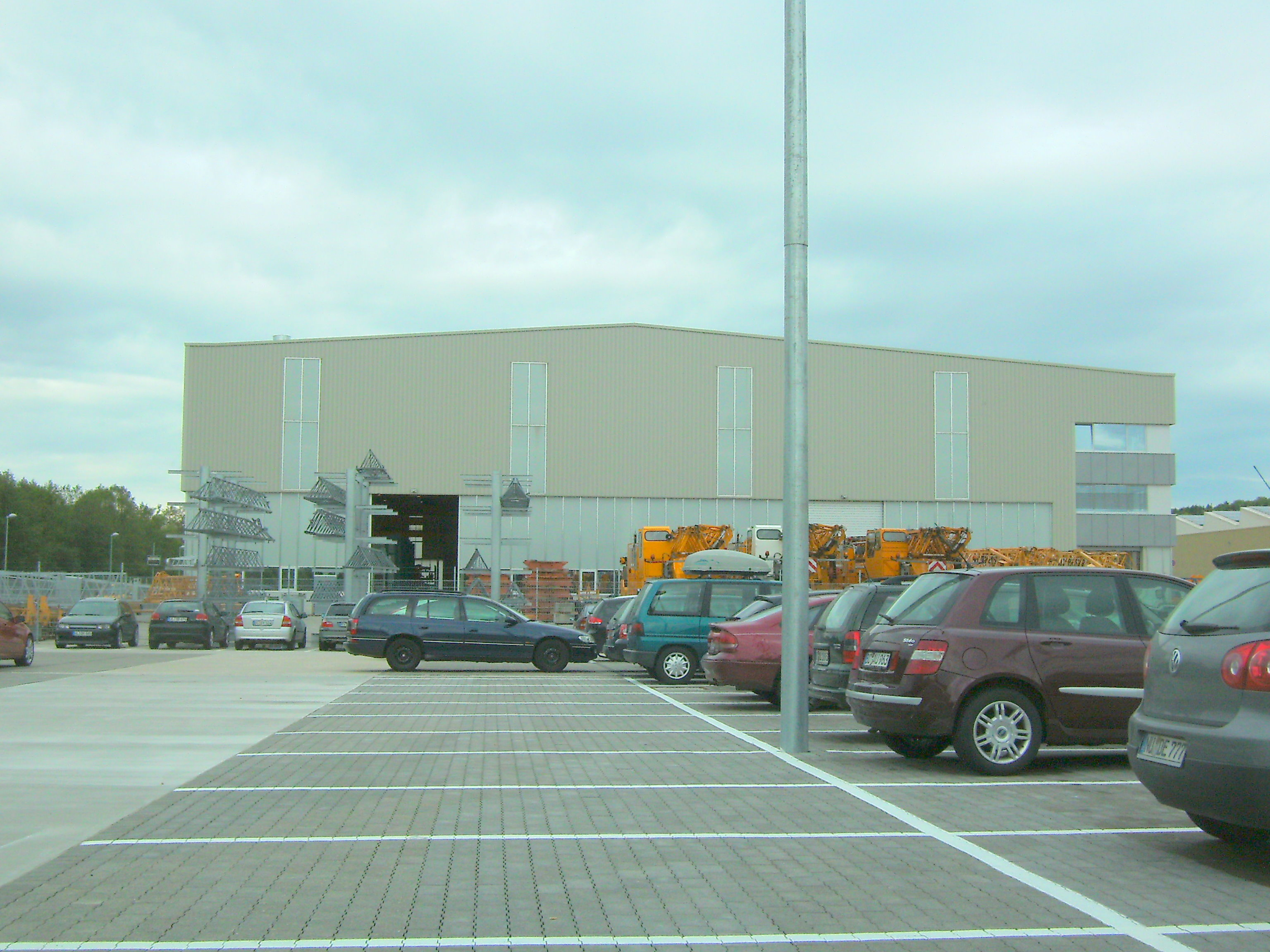 Liebherr Baukräne Werk Biberach